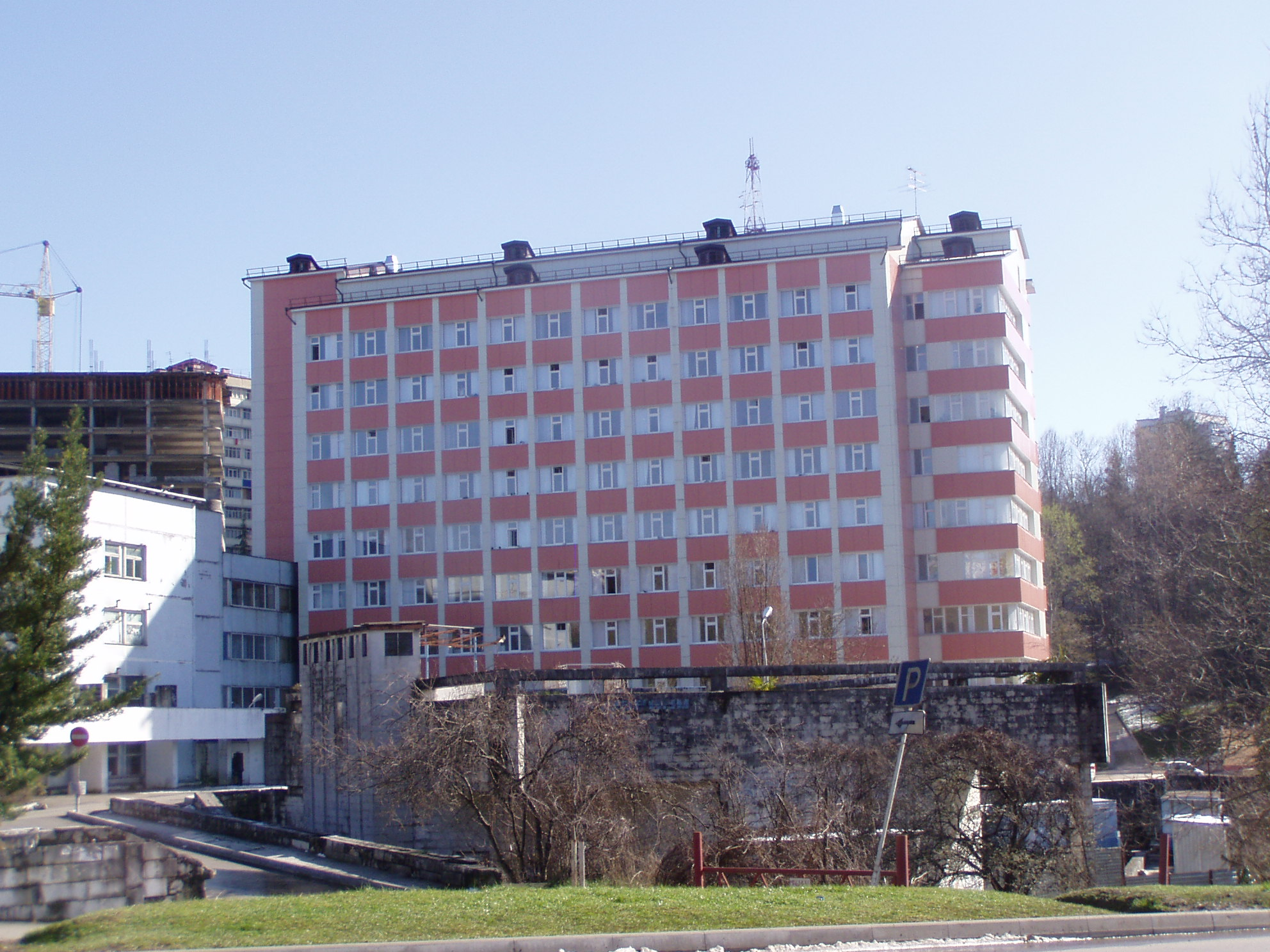 Кардиологическое отделение Горбольницы №4 г.Сочи